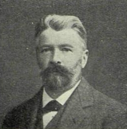 Глинка, Константин Дмитриевич